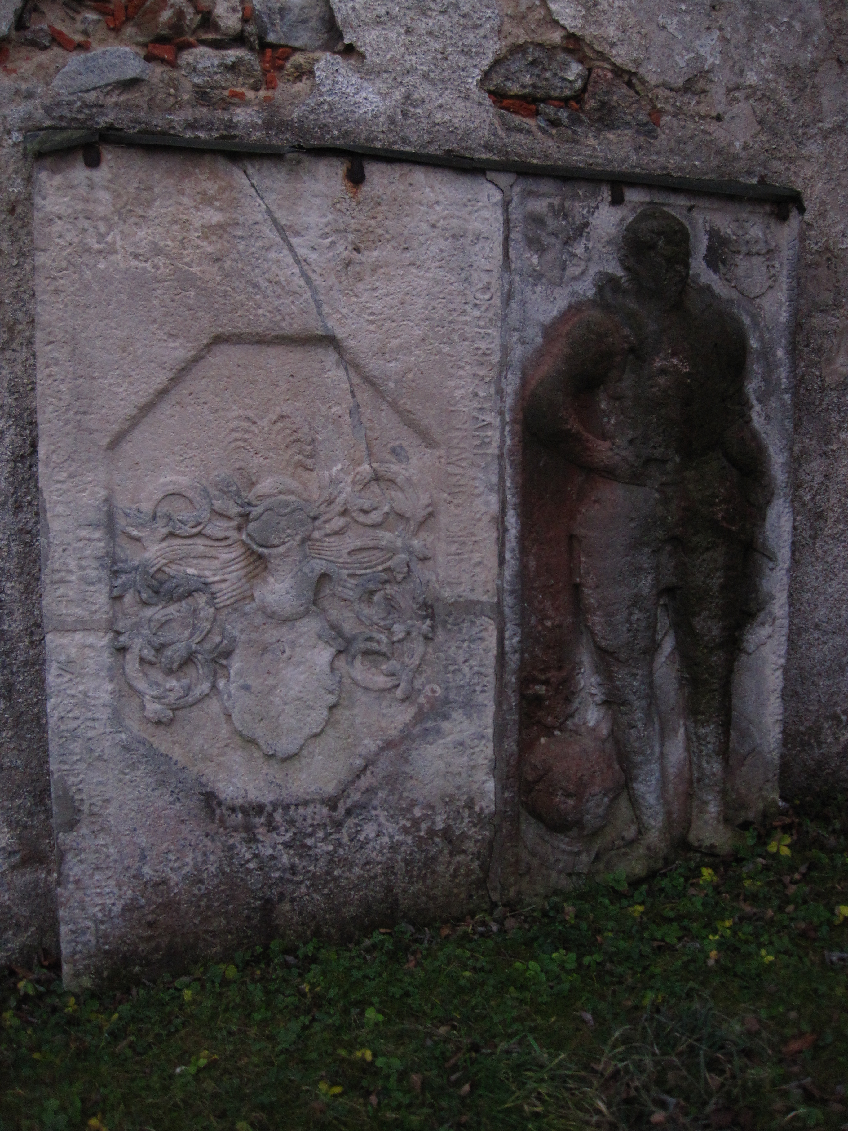 Kostel svatého Martina, střed obce, Dolní Oldřiš.